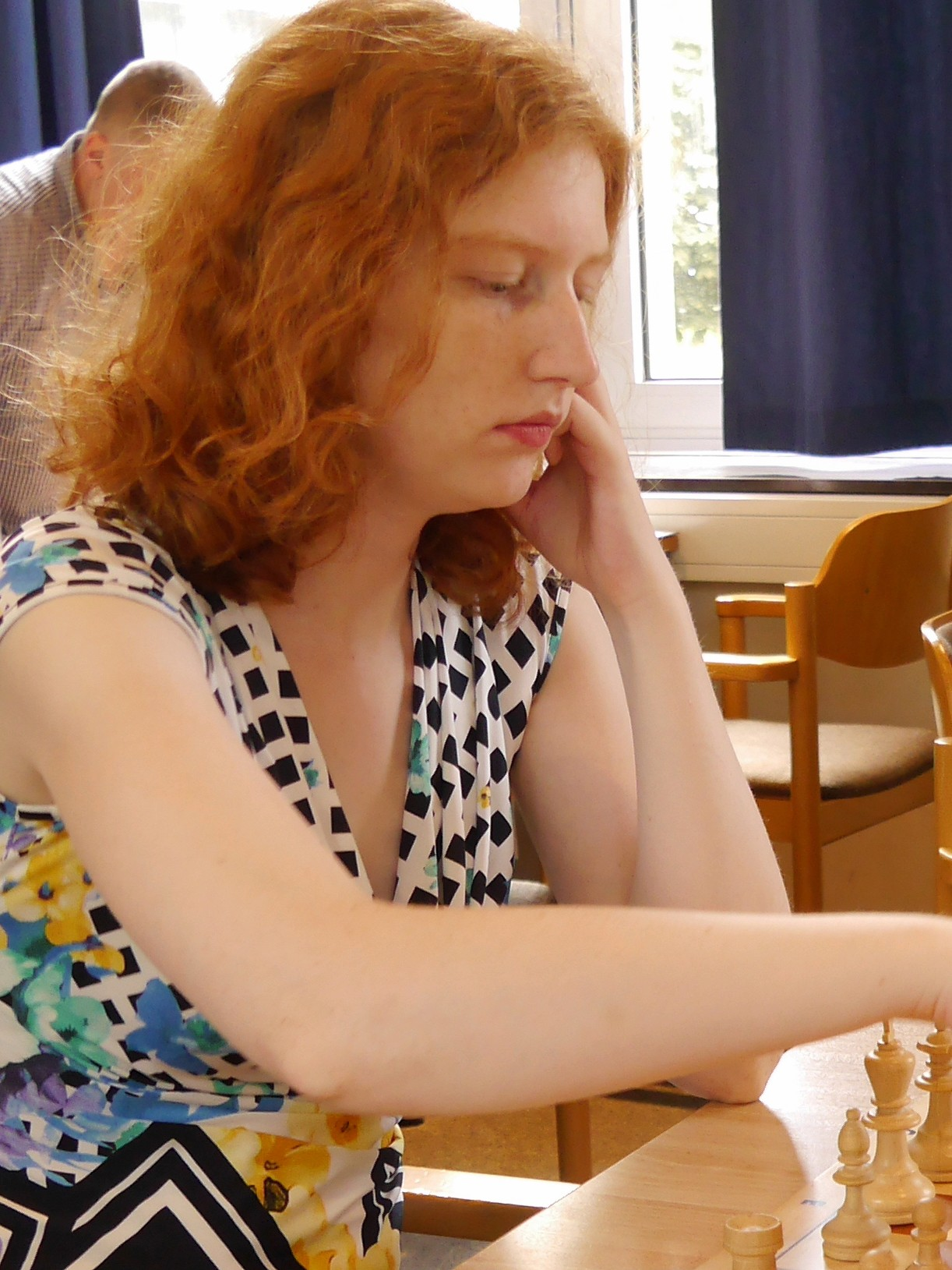 Hanne Goossens, Open A der Dortmunder Schachtage 2017.